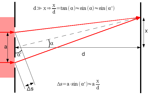 Schematischer Aufbau des Doppelspalt Experiments mit einer ebenen Lichtwelle